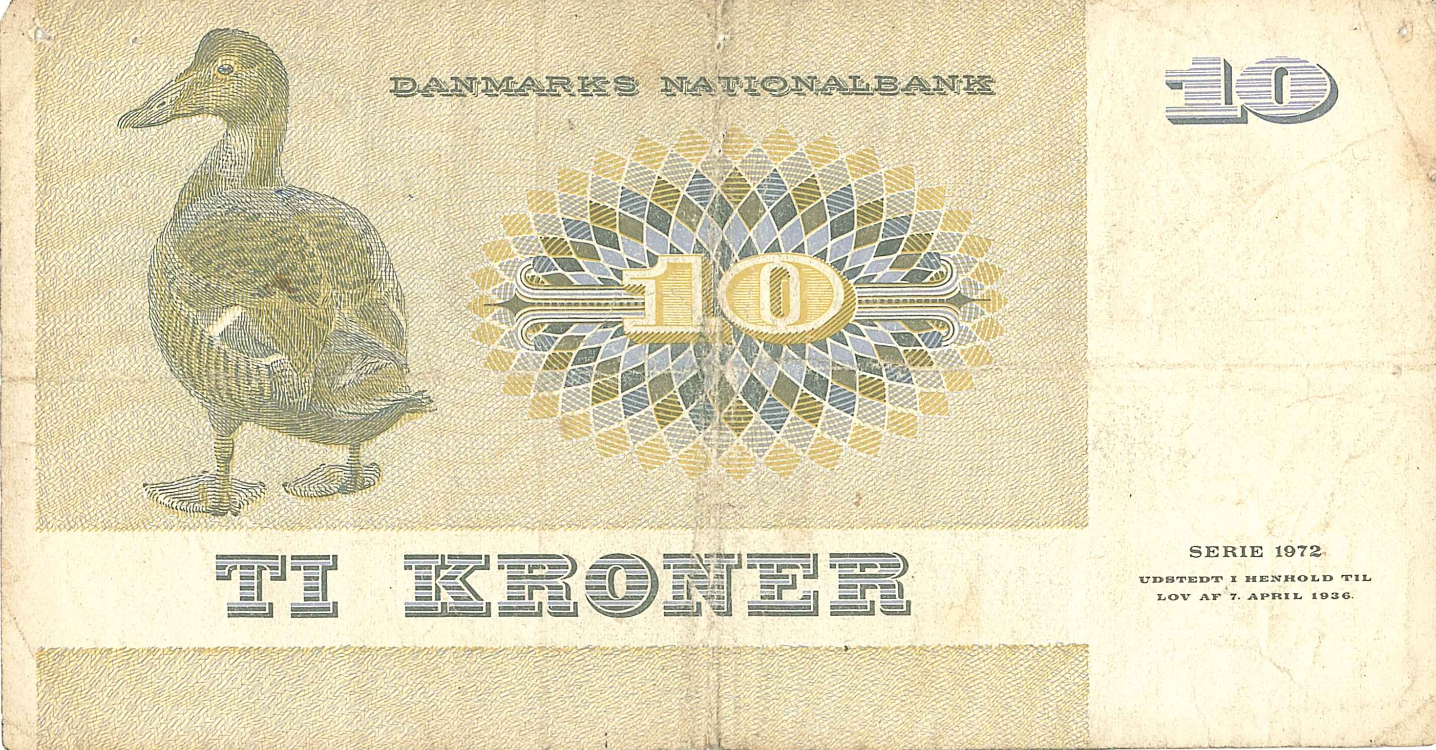 Geldschein 10 Dänische Kronen (1972)